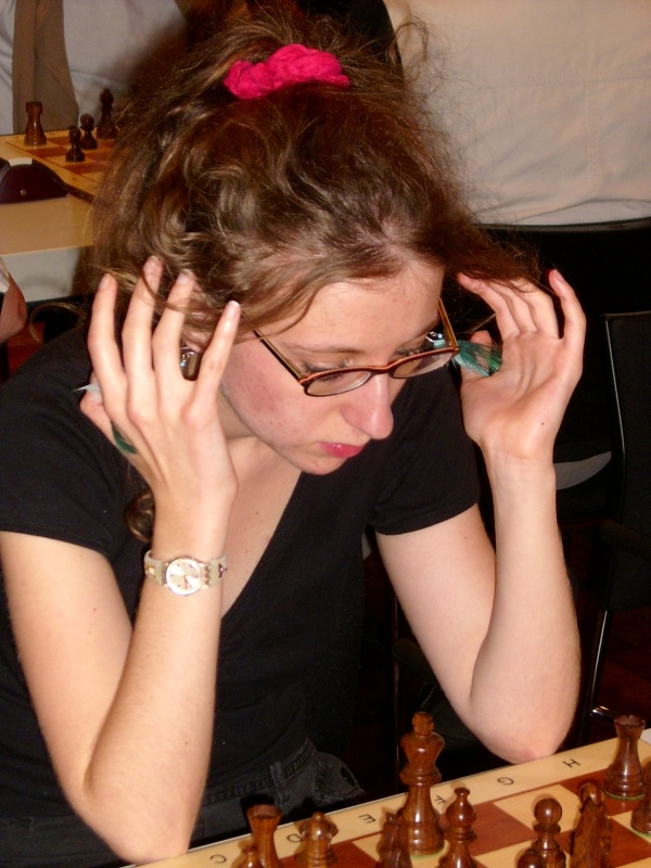 Marie Sebag, French Chess Grandmaster